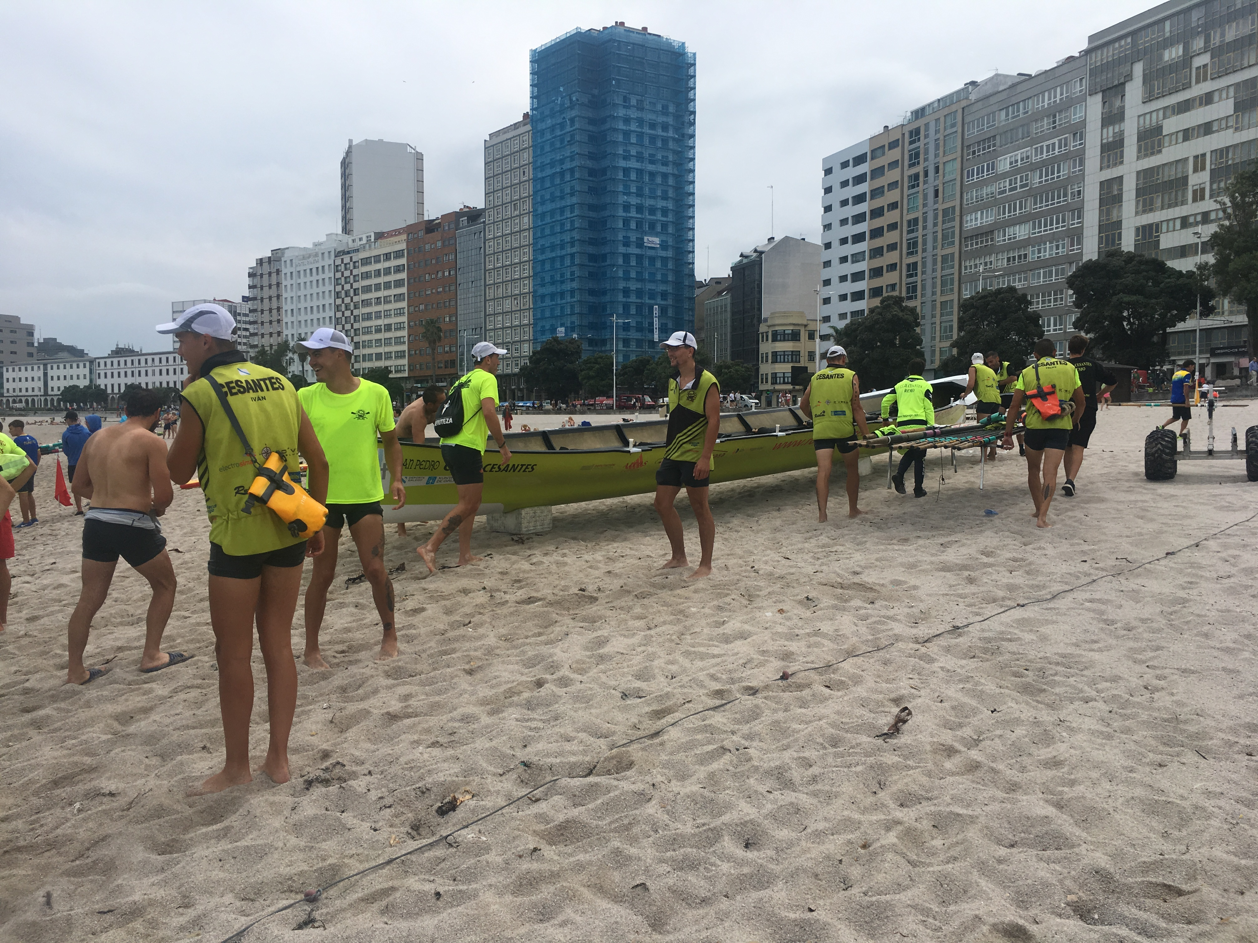 Trailers de Cesantes na Bandeira Teresa Herrera da Coruña en 2019.